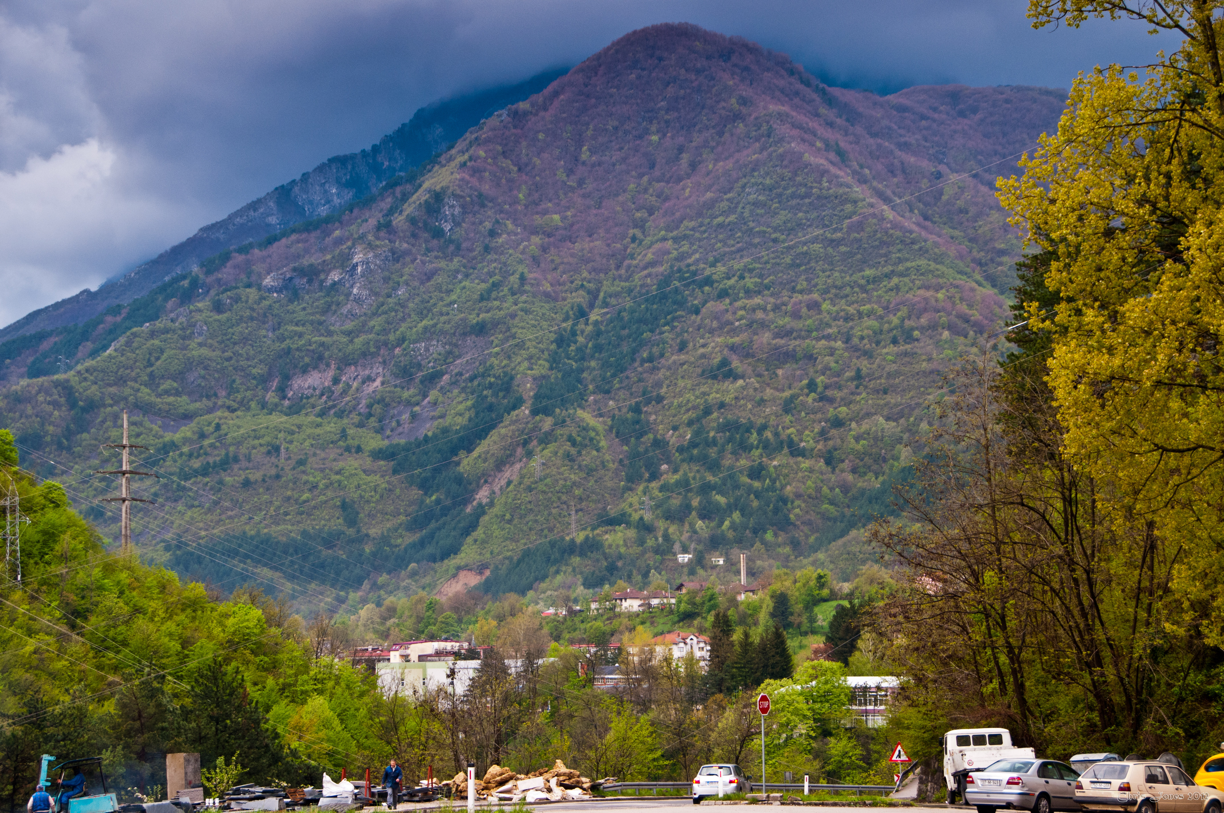 Bosnia and Herzegovina Apr-23-2012 140